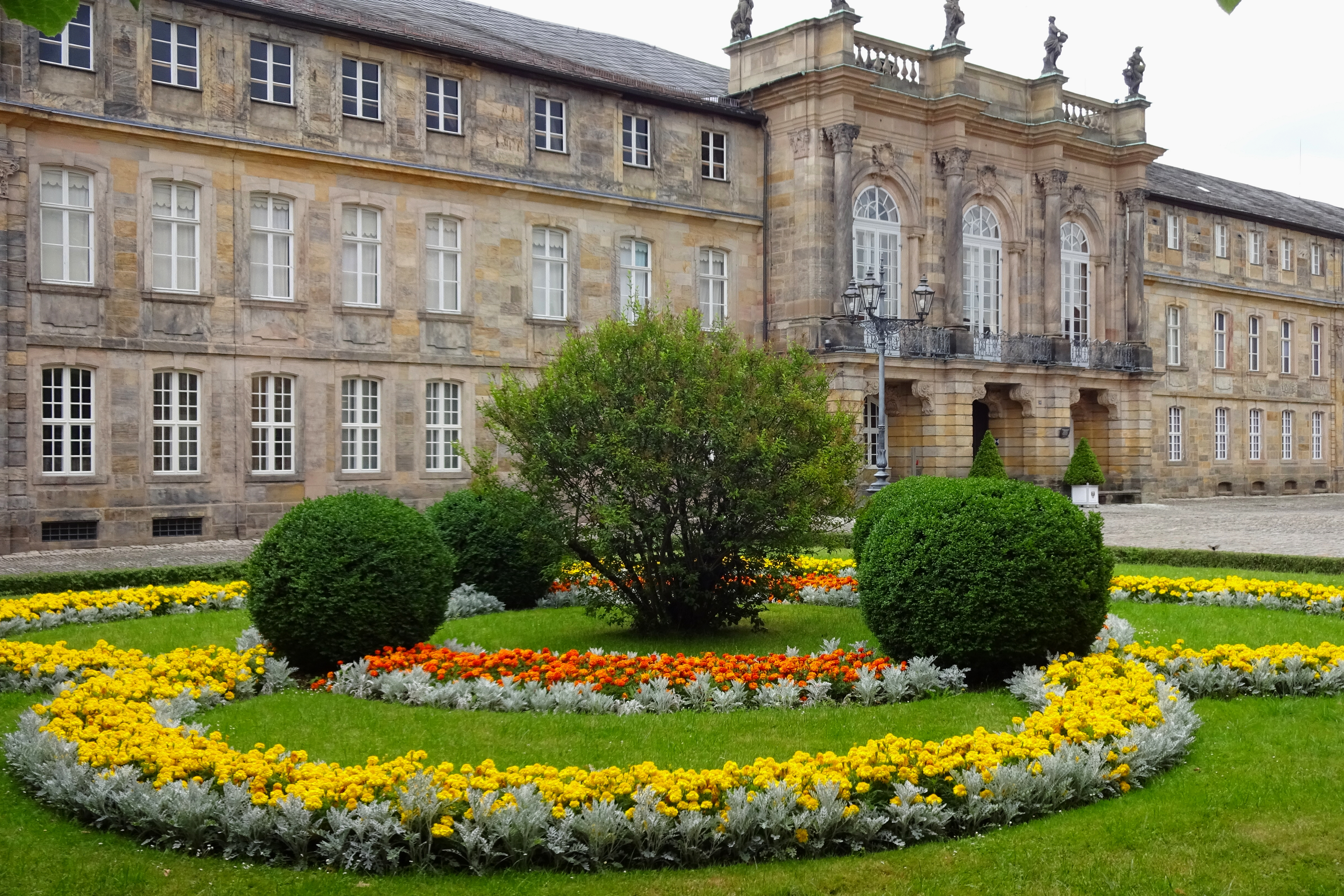 Bayreuth, Neues Schloss, Eingang, WestseiteThis is a photograph of an architectural monument.